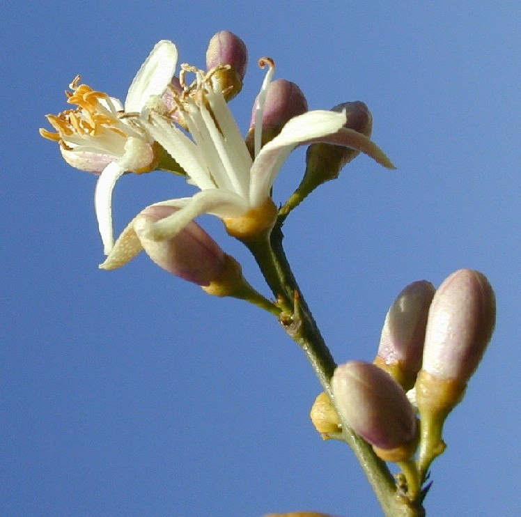 Fiori di Limone. Foto scattata a Roma il 25.4.01